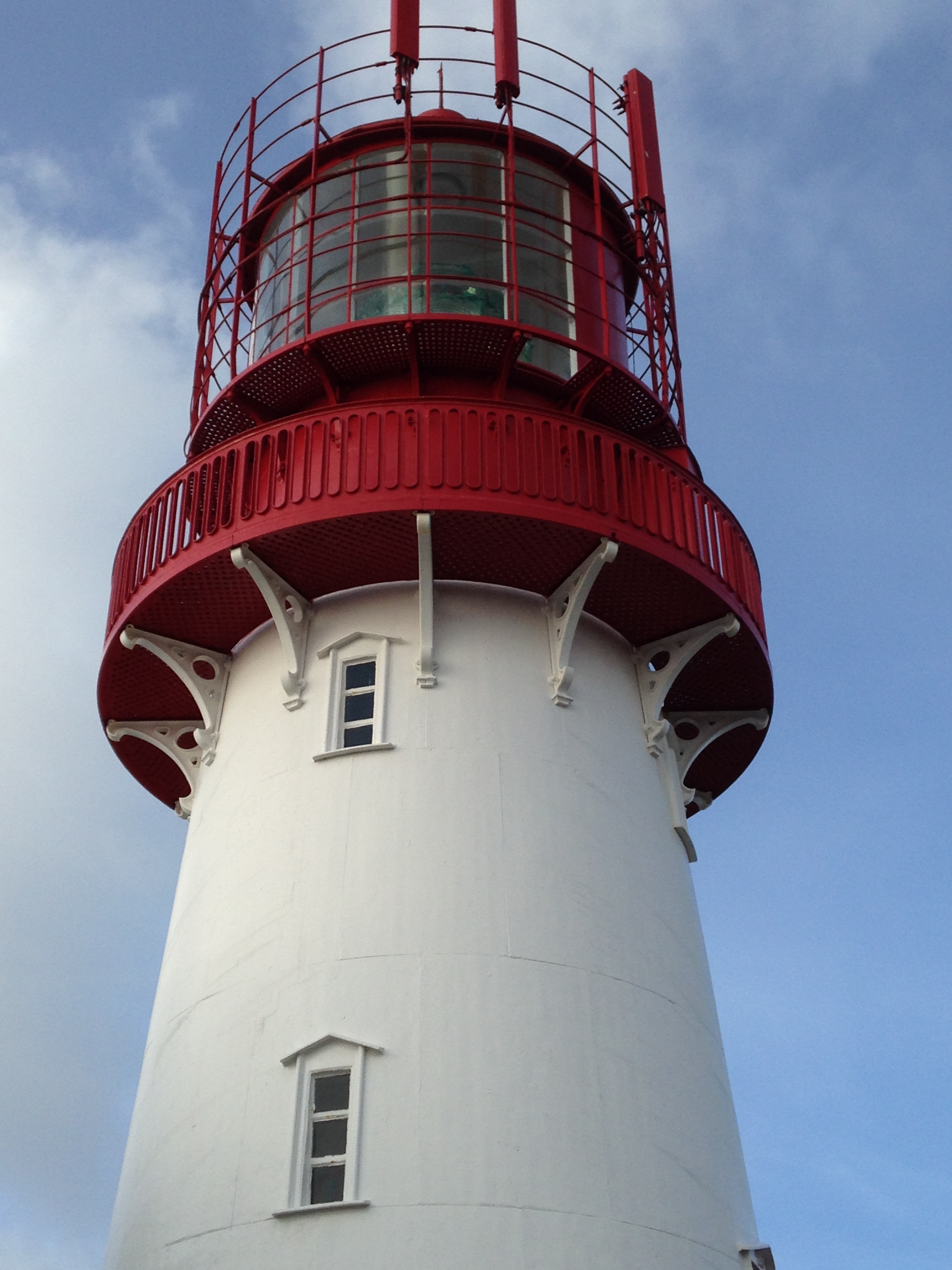 Nærbilde av Lindesnes fyr, okt 2015